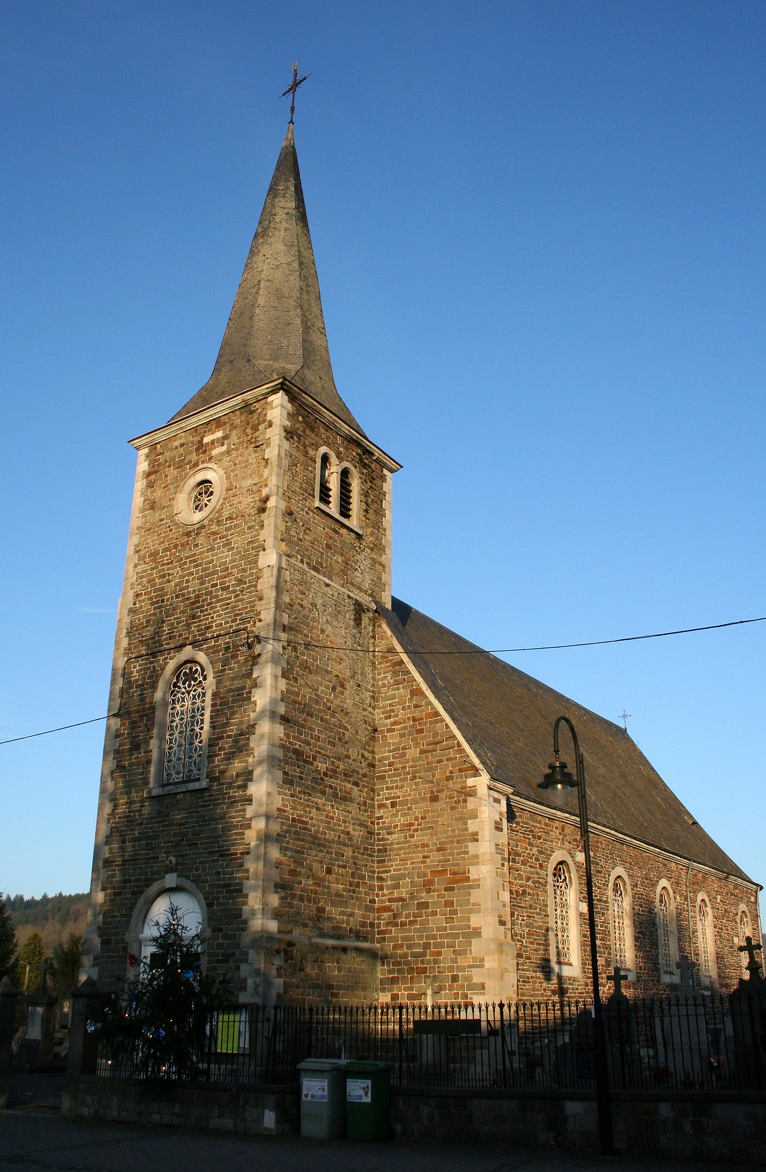 Rendeux-Bas (Belgique), l'église Sainte-Marie (1785).